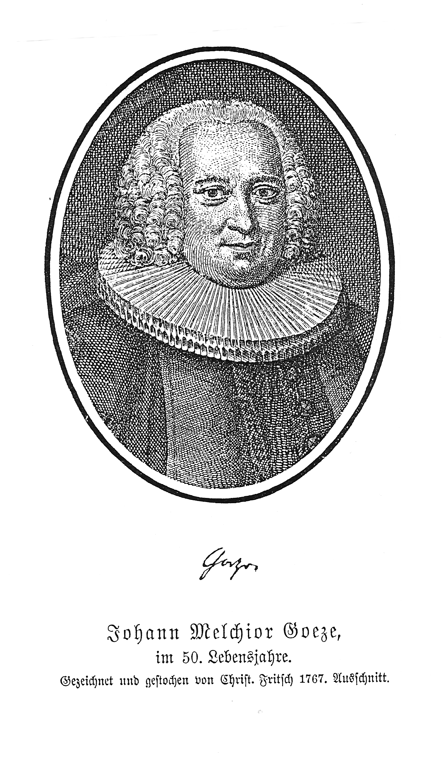 German Pastor Johann Melchior Goeze